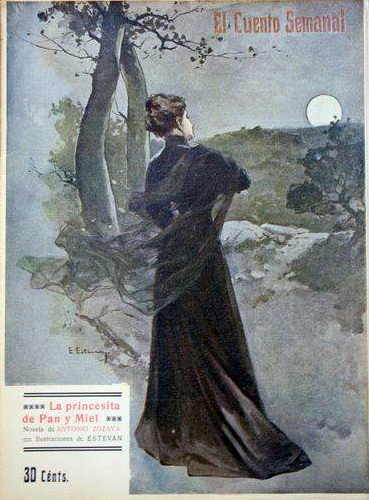 Portada de La princesita de pan y miel.